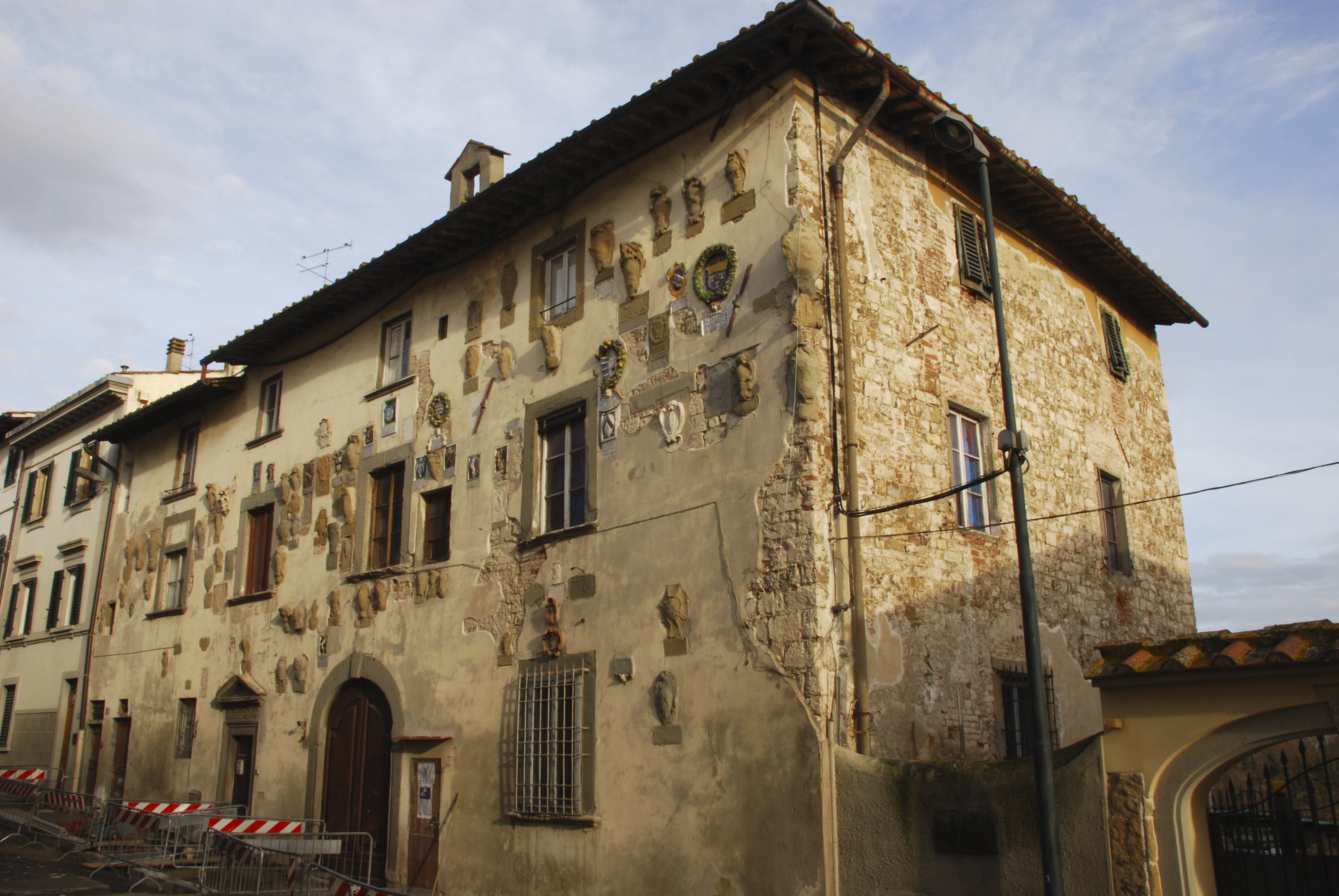 Palazzo Pretorio or Palazzo del Podestà, Galluzzo, Florence, Italy. Escutcheons: overview.